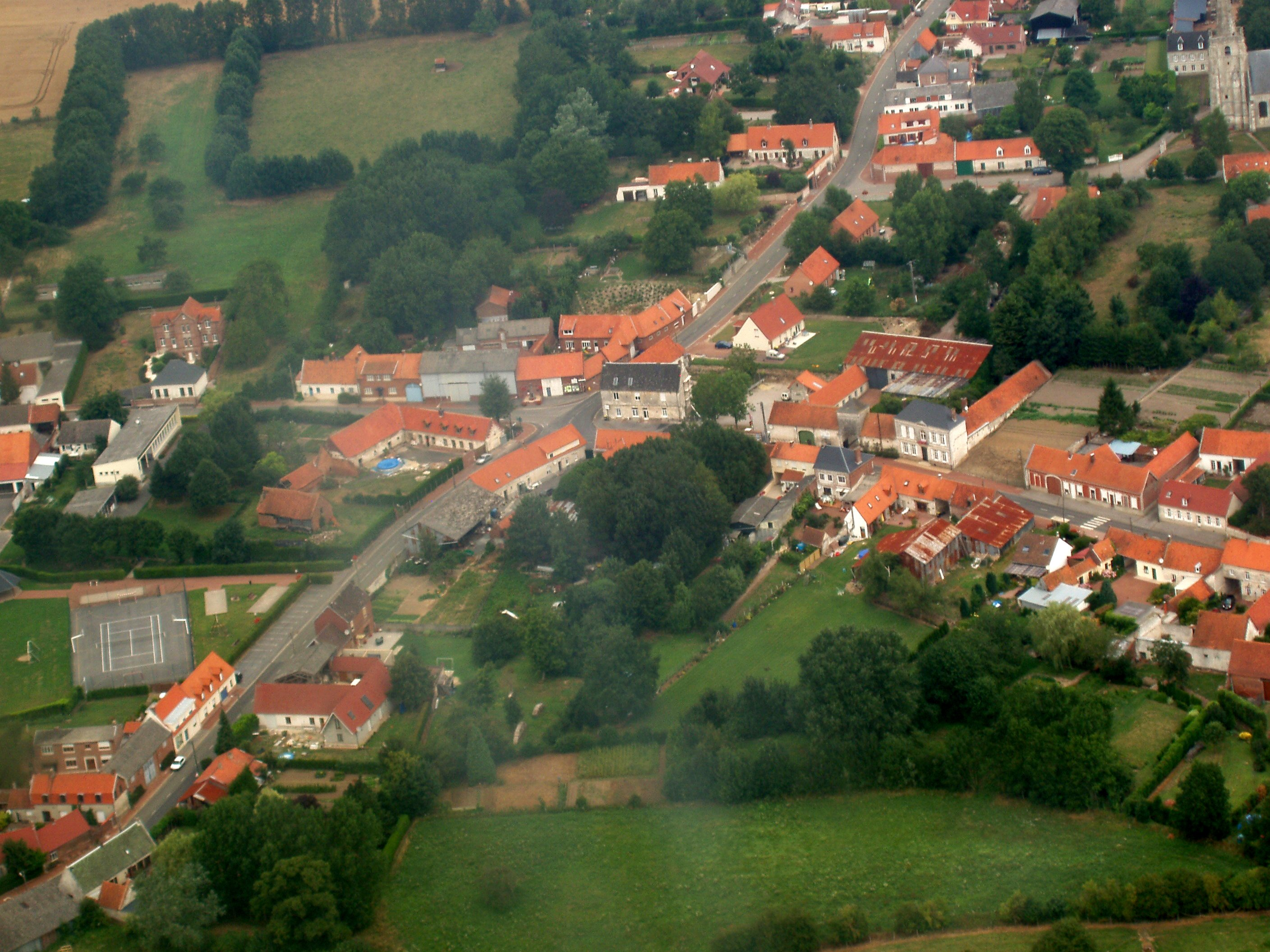 Photographie aérienne de Hermaville, Pas-de-Calais (62), France, prise vue d'avion (photo personnelle recontrastée avec The Gimp). Au centre, place du Caillet au croisement des rues du Moulin (à gauche), d'Arras (à droite), d'Aubigny (en haut), d'Izel (en bas), Monument au mort. Sur le bord centre gauche de la photo, école. En dessous, le plateau d'évolution avec le cours de tennis. En haut à droite, église d'Hermaville.